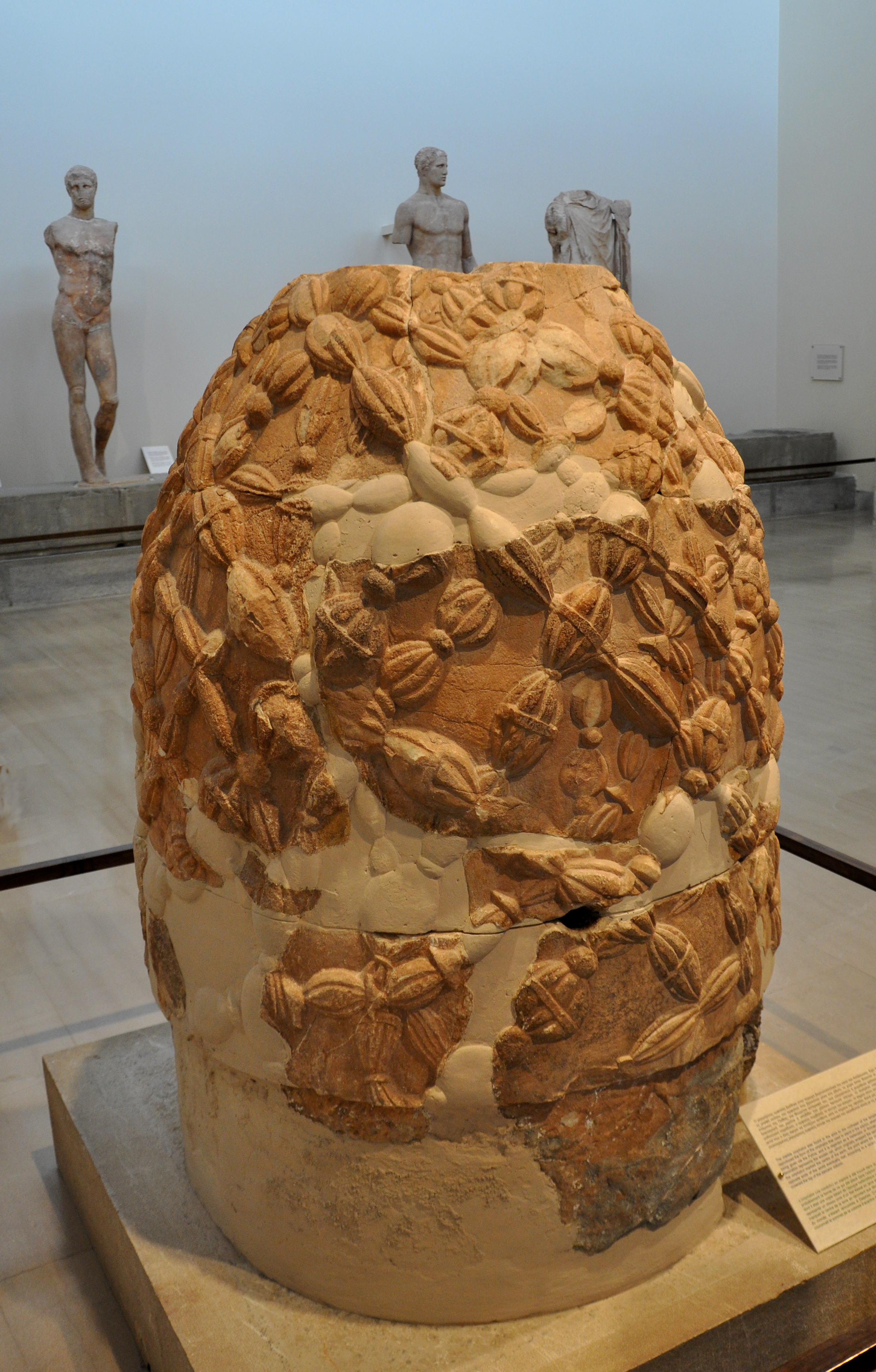 Omfalos eller "jordens navel" i Delphi arkeologiska museum.